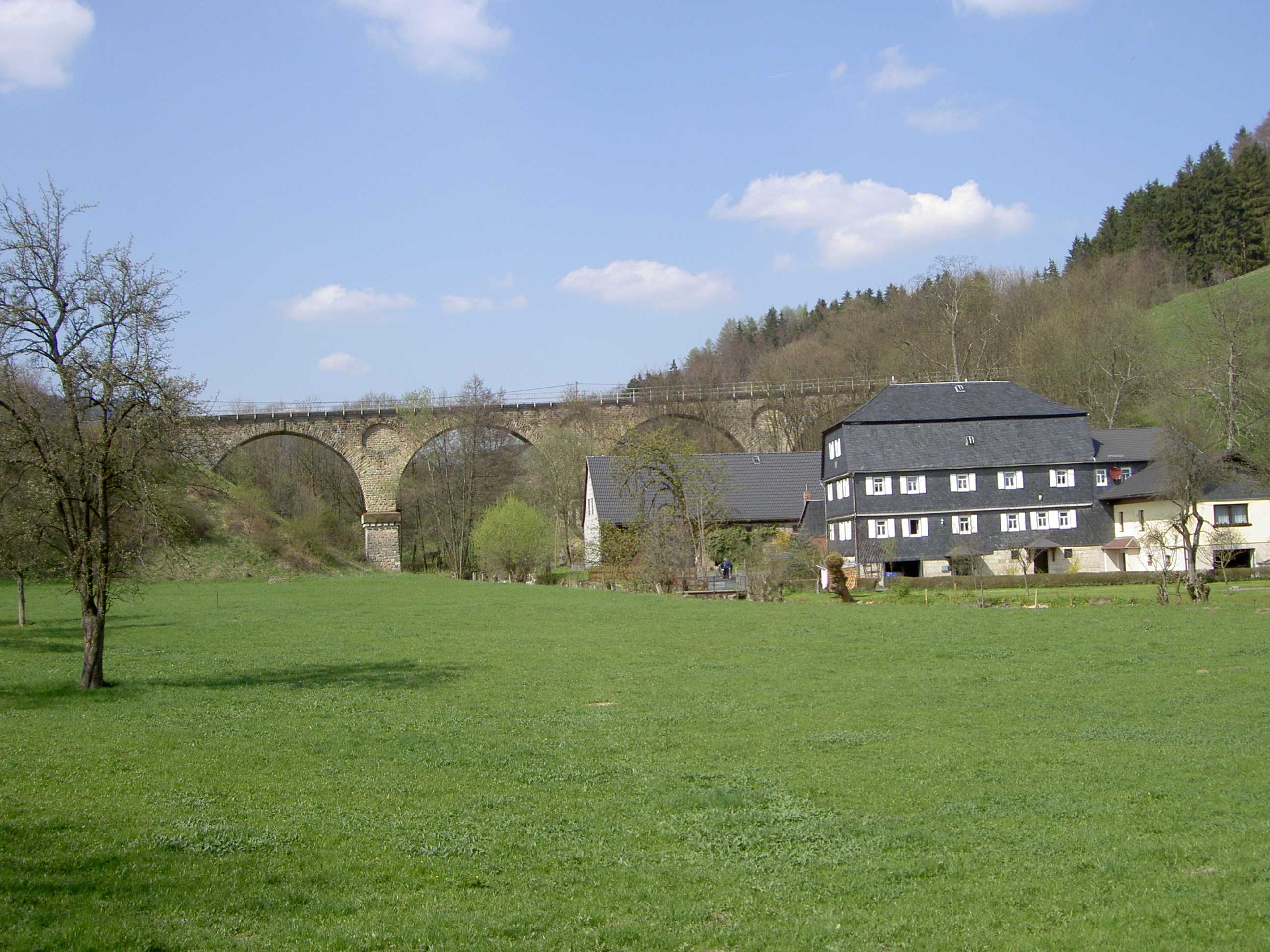 Viadukt von Mengersgereuth-Hämmern am 23.04.2005 selbst fotografiert GNU-FDL